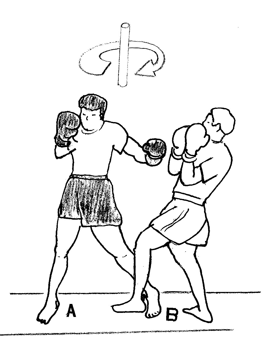 rassemblement.jpg